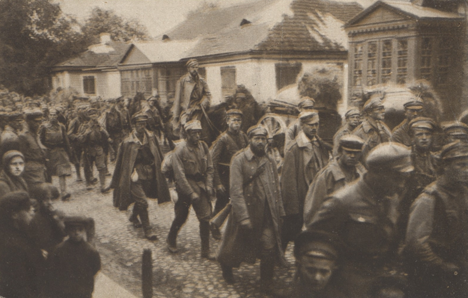 Wkroczenie I Brygady Legionów Polskich do Kowla. Na koniu por. Włodzimierz Koniczny.